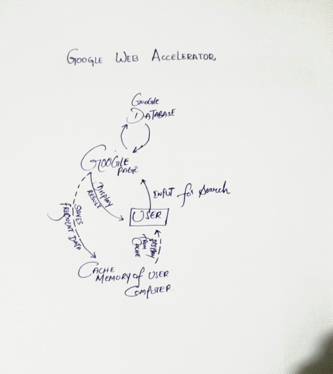 गूगल वेब एक्सीलरेटर का नमुना